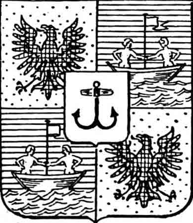 Stemma Casa Sizzo di Schwarzburg